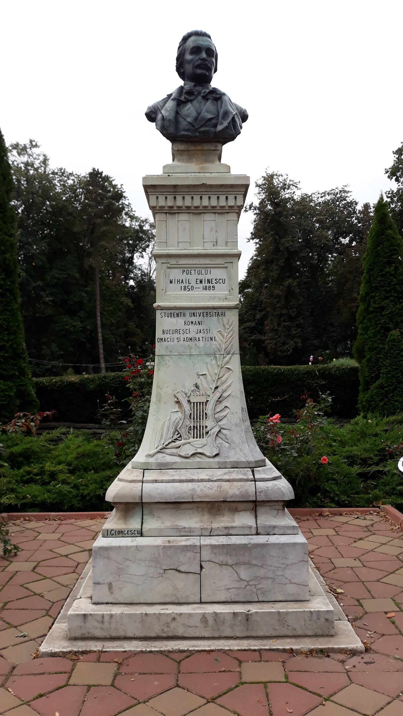 Primul bust din ţară dedicat poetului nepereche, Mihai Eminescu, a fost realizat de sculptorul Ion Georgescu în 1890.